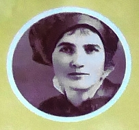 Emma Kunz Zentrum, Informationstafel,Würenlos